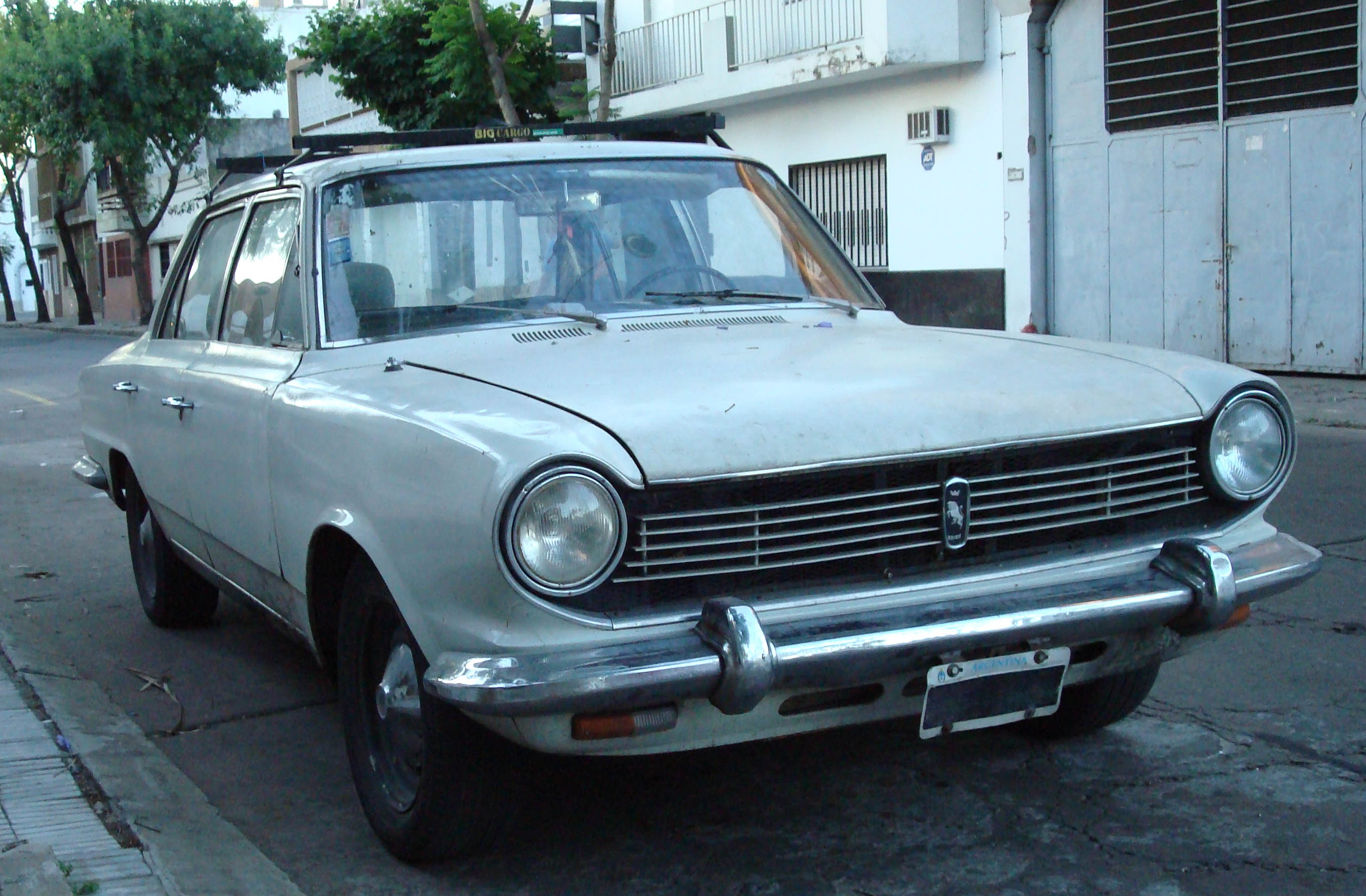 Un modelo L del auto argentino Torino, en Rosario, Santa Fe.